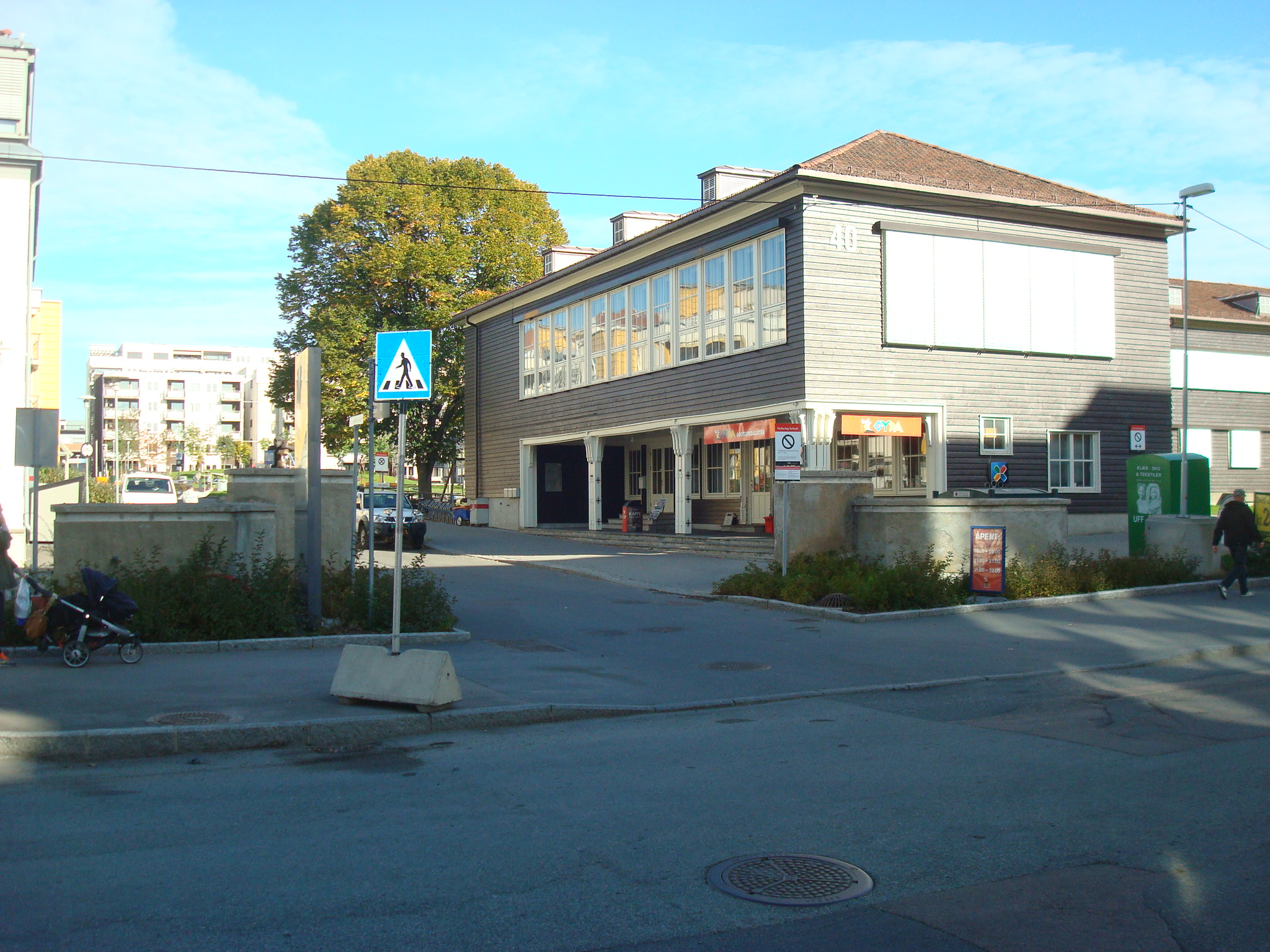 Bygninger fra gamle Løren leir i Oslo.